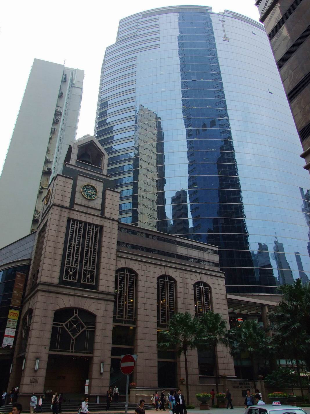 新紀元廣場低座